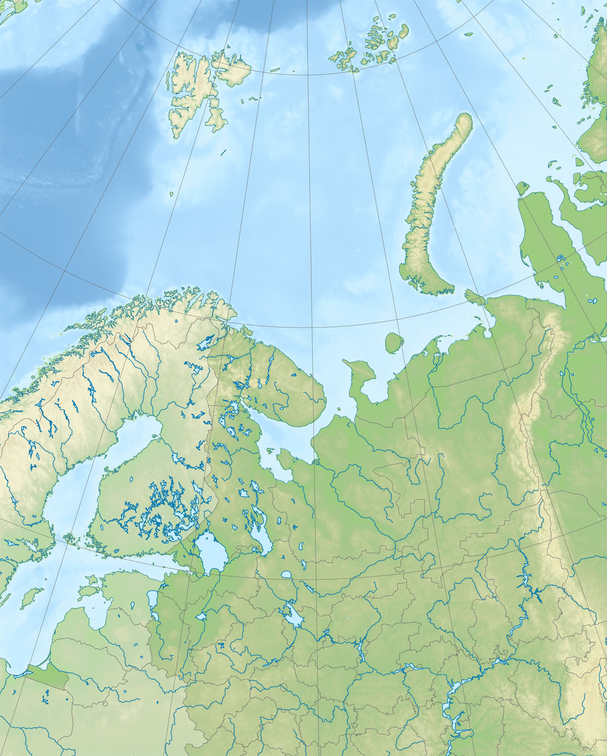 Физическая карта Северо-Западного федерального округа Проекция — коническая равнопромежуточная. первая стандартная параллель — 60°00′с.ш. вторая стандартная параллель — 76°00′с.ш. средний меридиан — 39°00′в.д. Формулы расчёта координат: x = #expr: 50 + 190.9859317 * (1.588221132 - ( {2 }*pi / 180)) * sin(0.924174135 * ( {1 } - 39) * pi / 180) * 1.244166667 y = #expr: 50 - 190.9859317 * (0.401397241 - (1.588221132 - ( {2 }*pi / 180)) * cos(0.924174135 * ( {1 } - 39) * pi / 180))